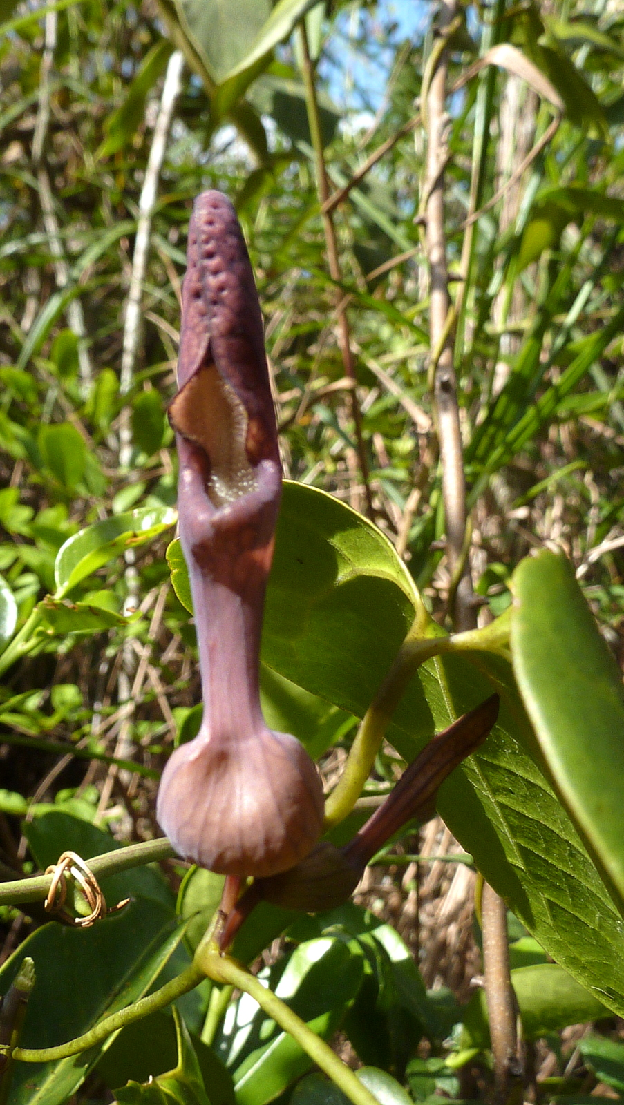 Aristolochia tamnifolia (Klotzsch) Duchartre